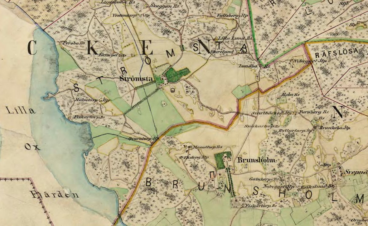 Strömsta och Brunnsholm